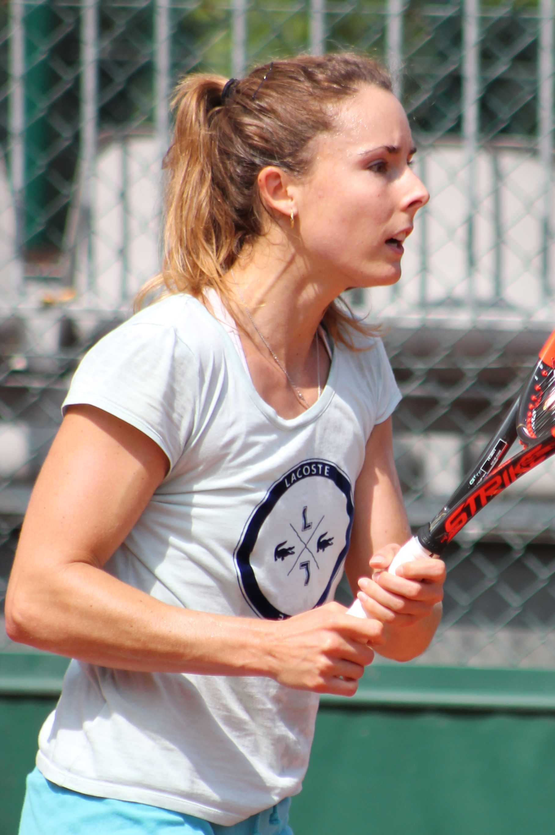 Cornet RG16 (7)